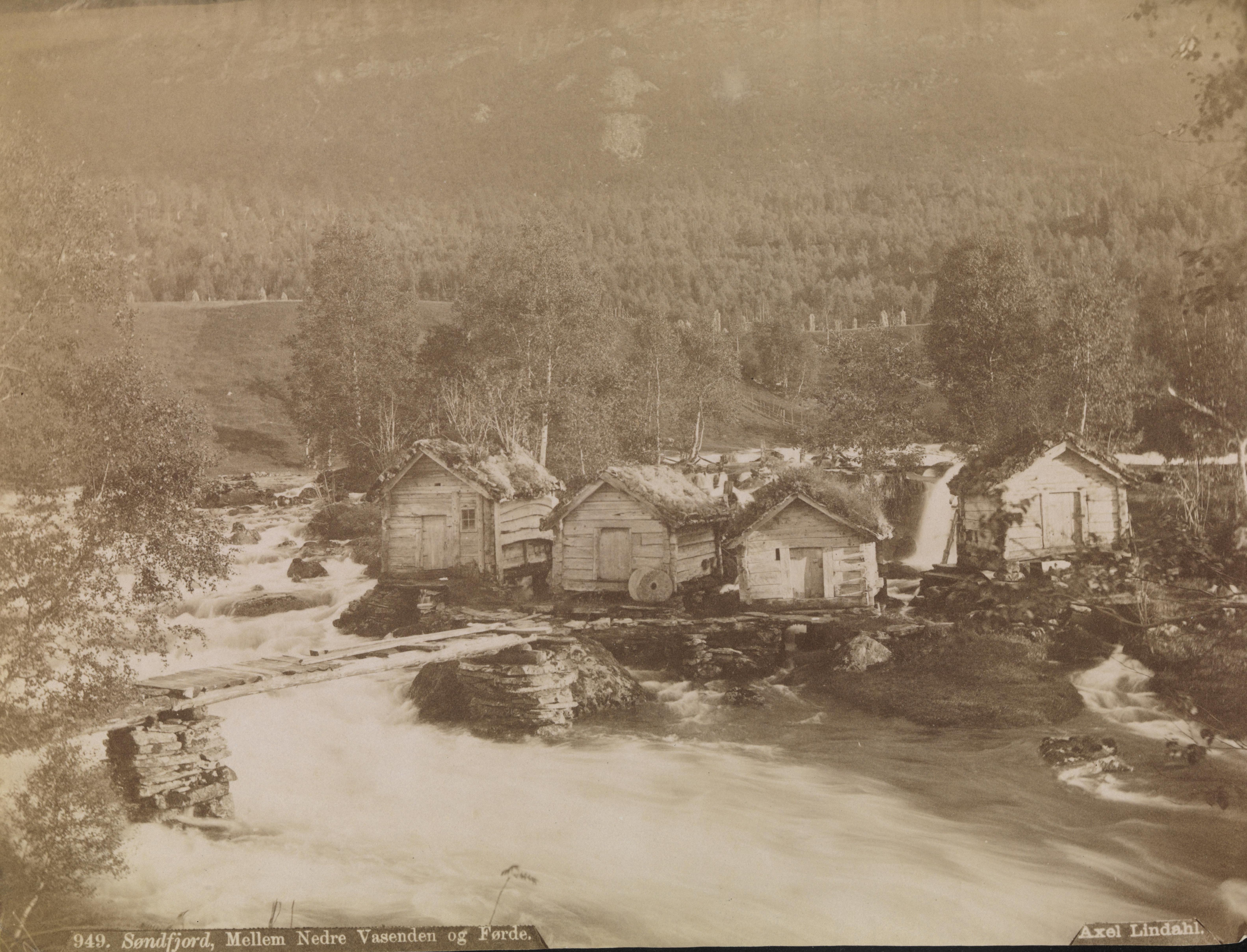 Bildet er hentet fra Nasjonalbibliotekets bildesamling Sogn og Fjordane